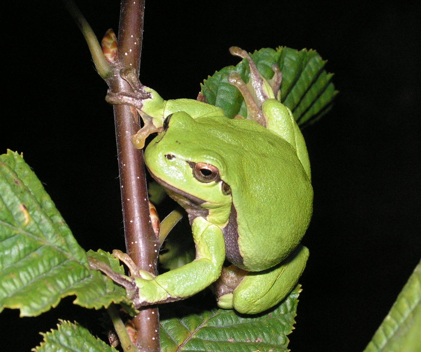 Rosnička zelená (Hyla arborea)